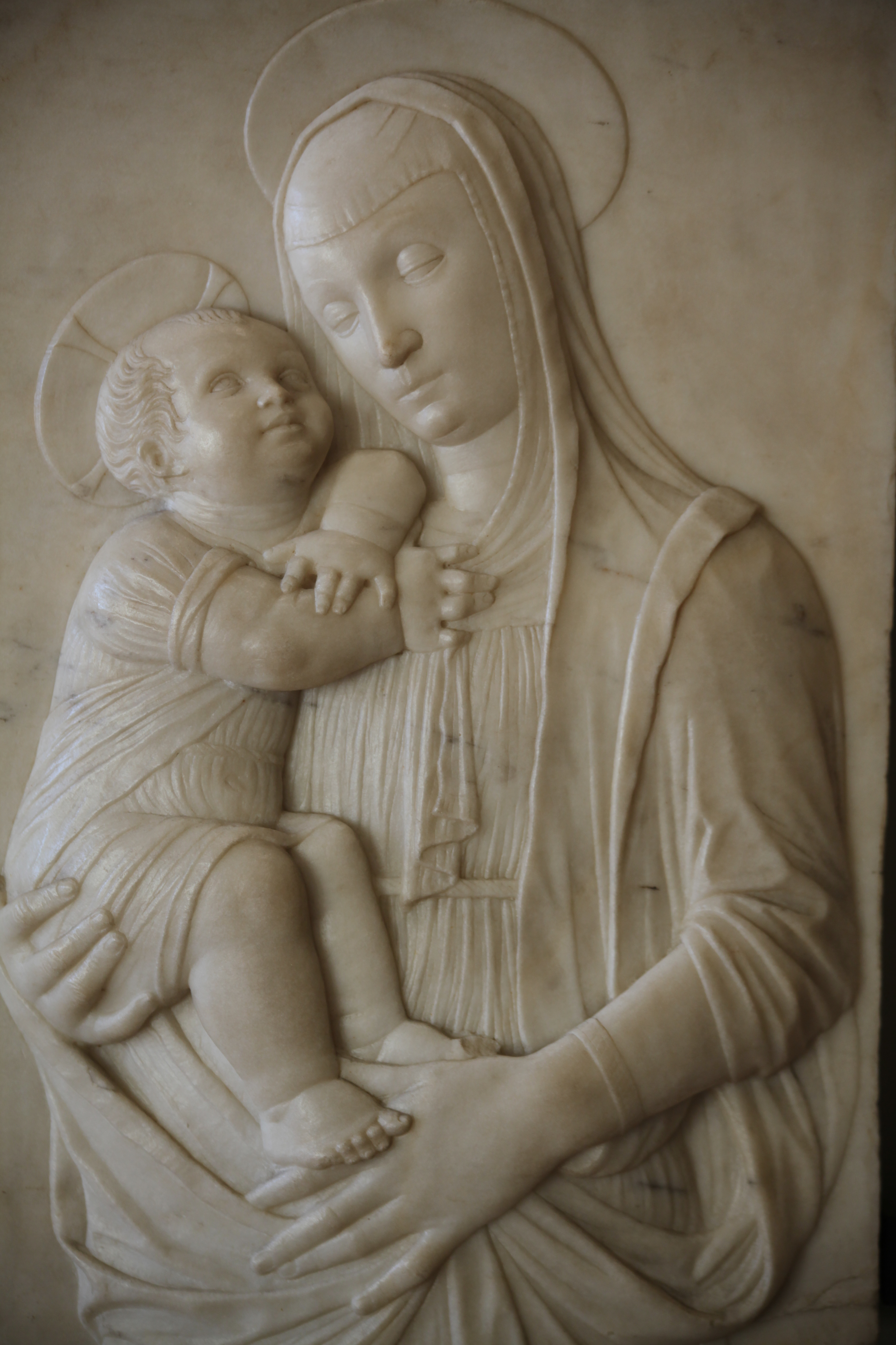 Galleria G. Franchetti alla Ca' d'Oro - MIBAC This is a photo of a monument which is part of cultural heritage of Italy.